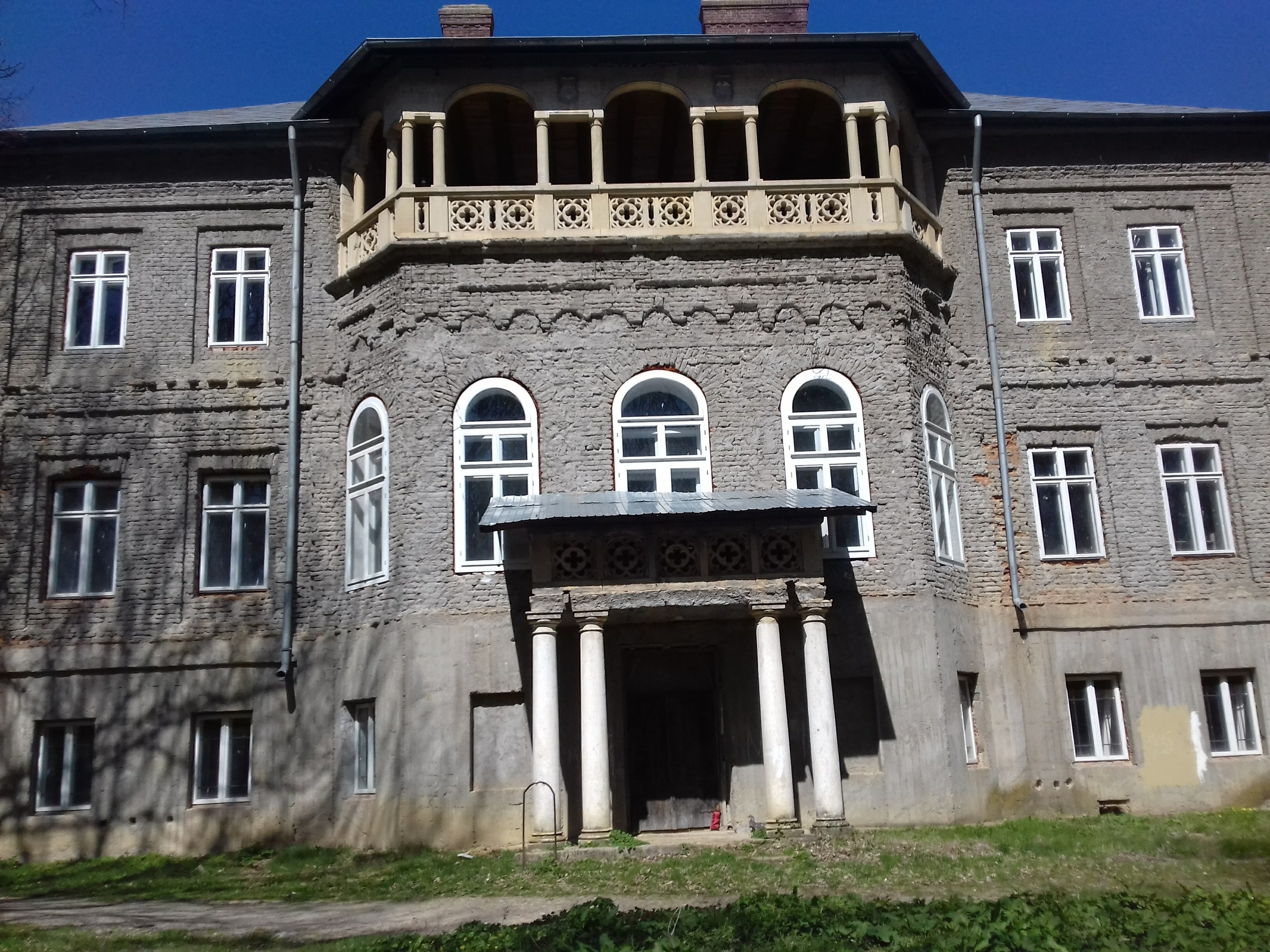 Conacul Petre P. Carp vazut din față